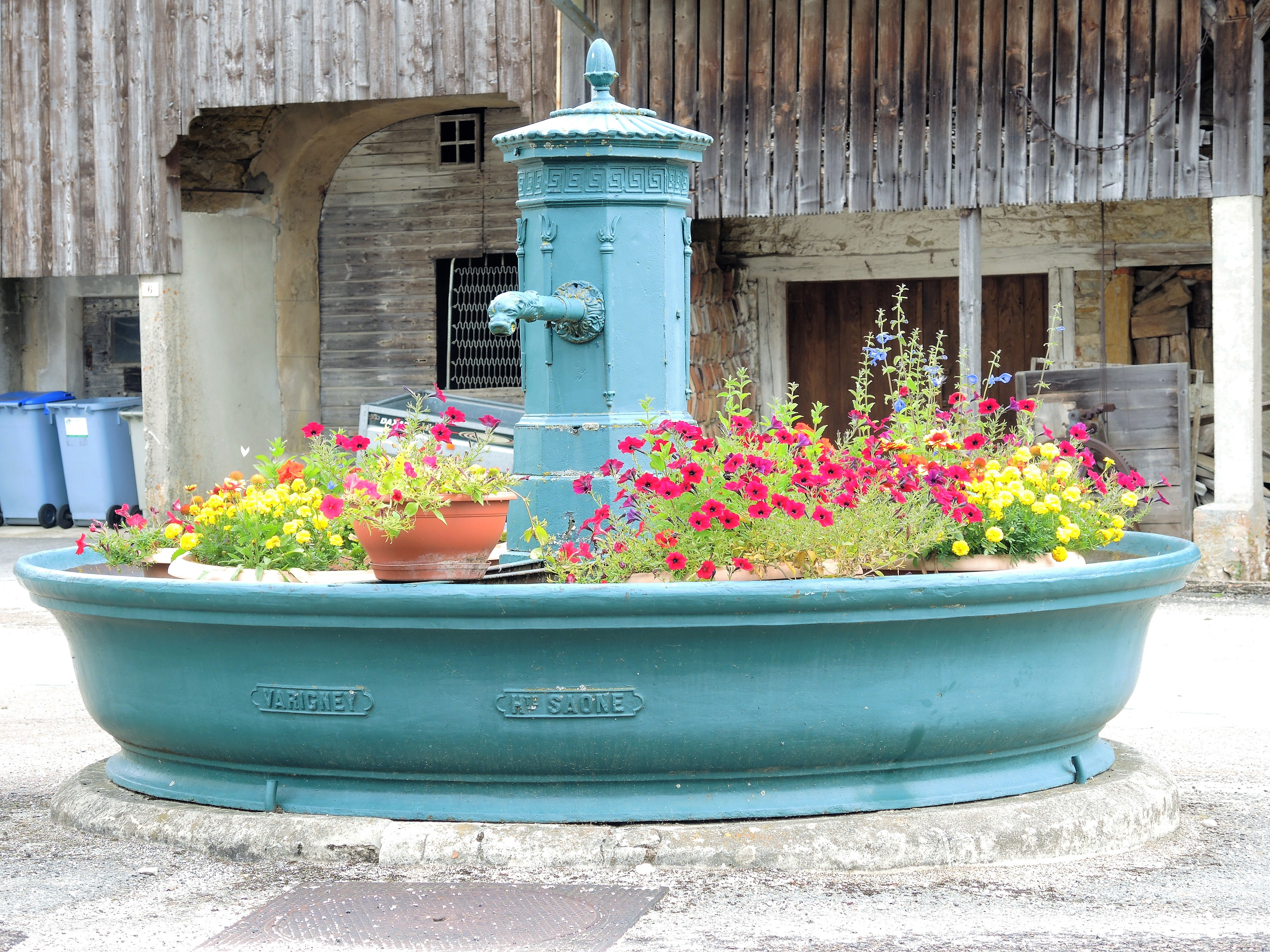 Ancienne fontaine à Cuvier. Jura